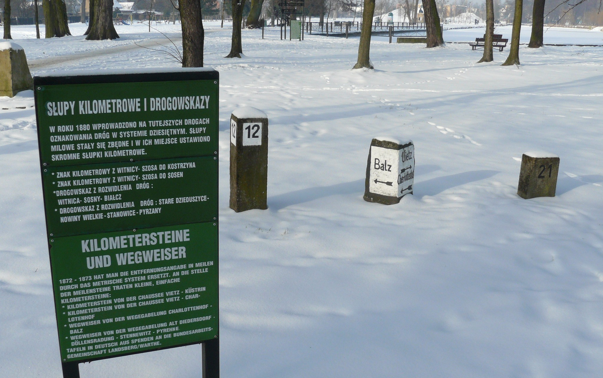 Park Drogowskazów - Witnica.